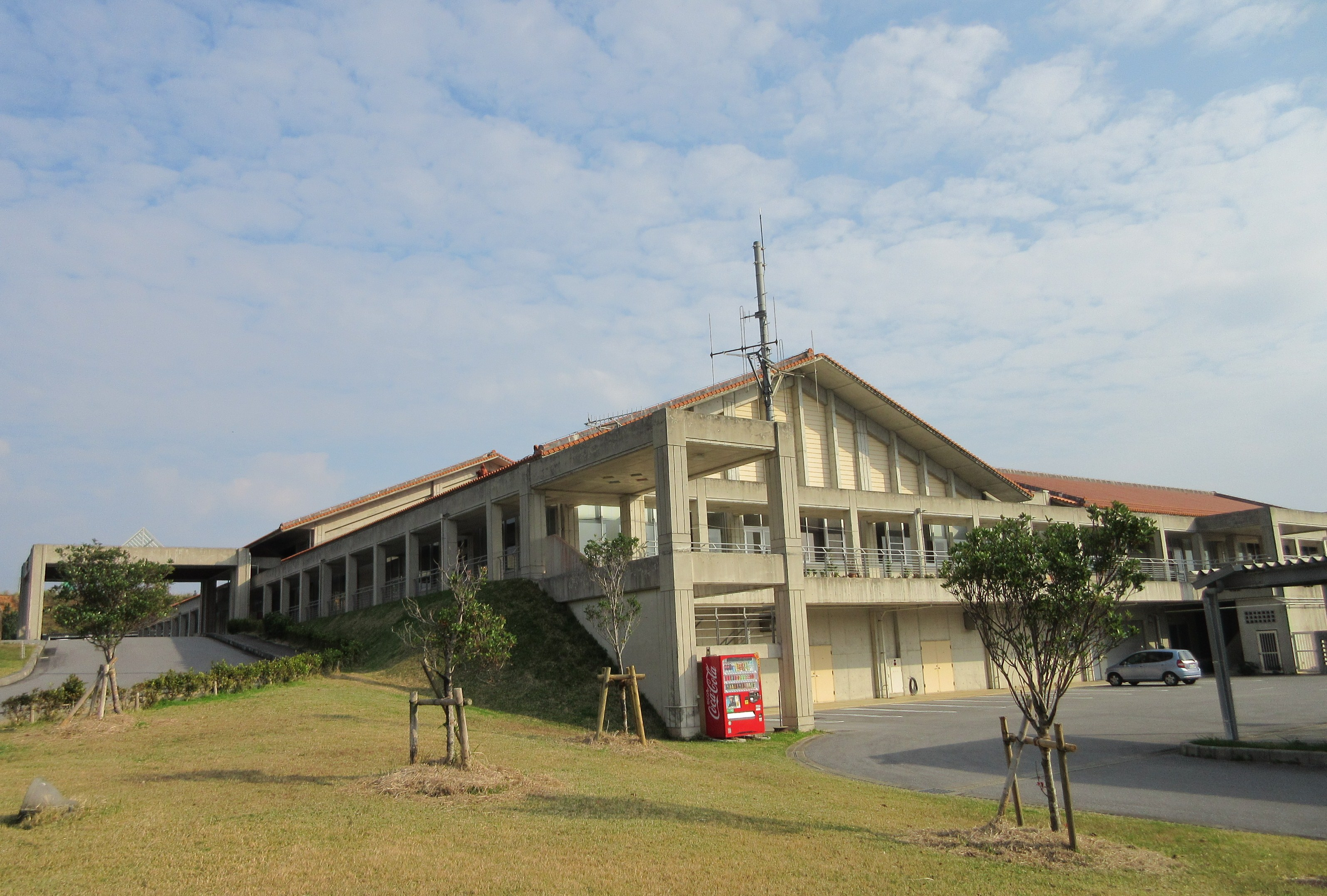 沖縄県東村役場